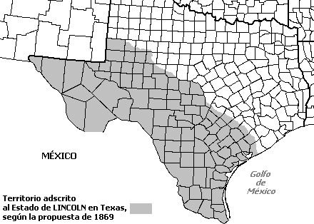 MApa de propuesta Estado Lincoln en territorio de Texas (1869)